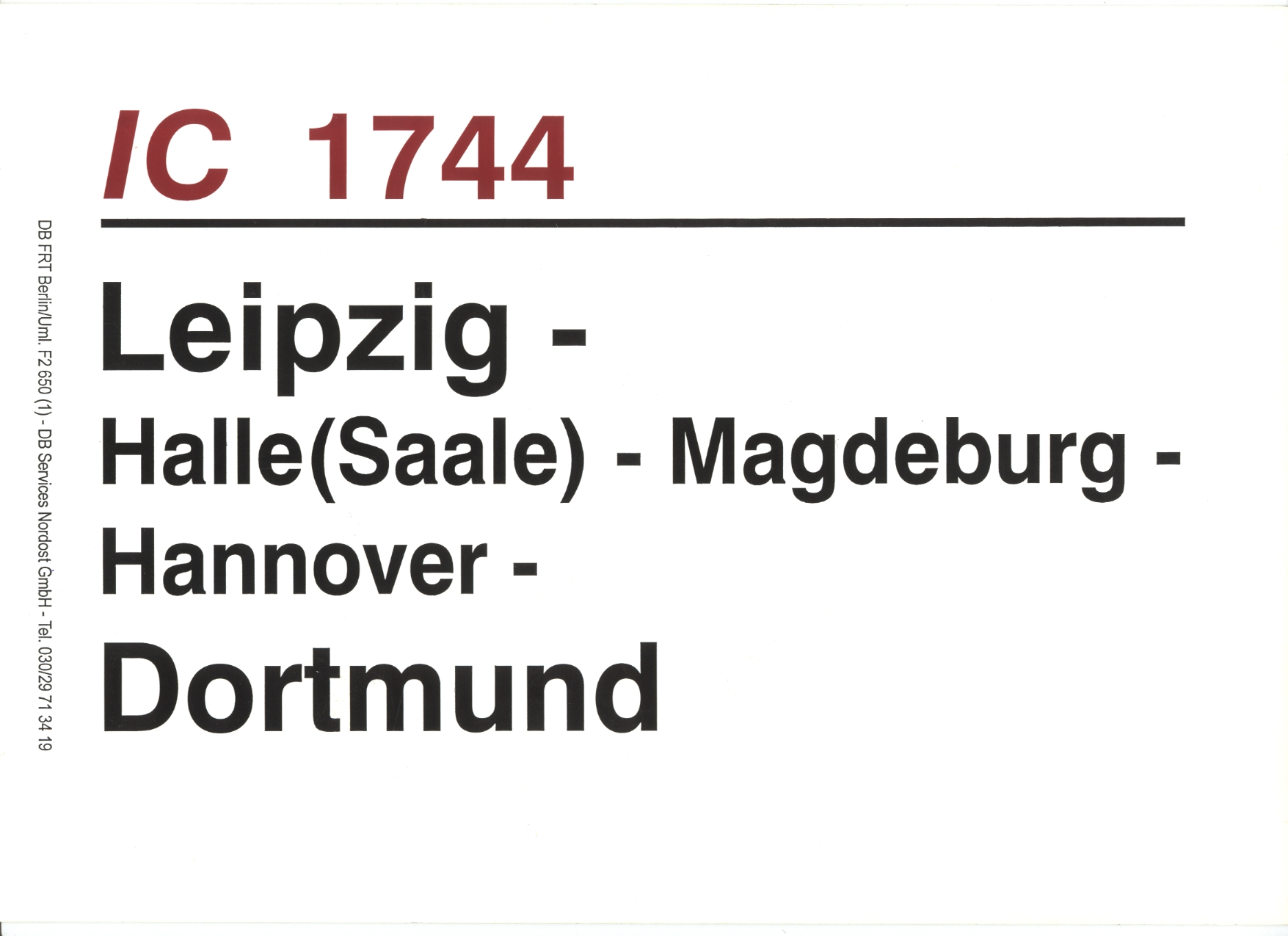 Zuglaufschild des IC 1744 der Deutschen Bahn vom Metropolitan-Zug von 2005